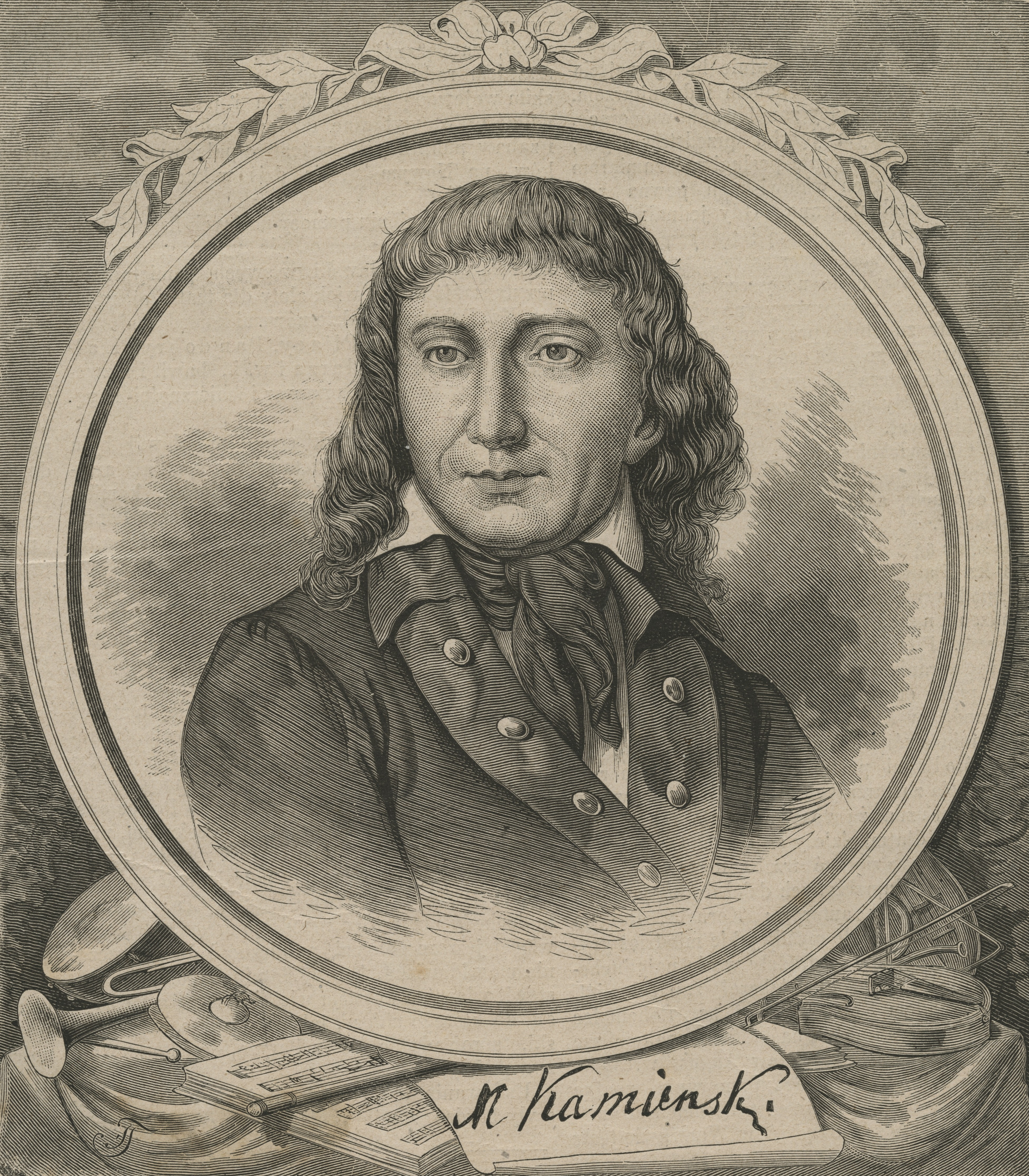 Maciej Kamieński, twórca pierwszej opery polskiej